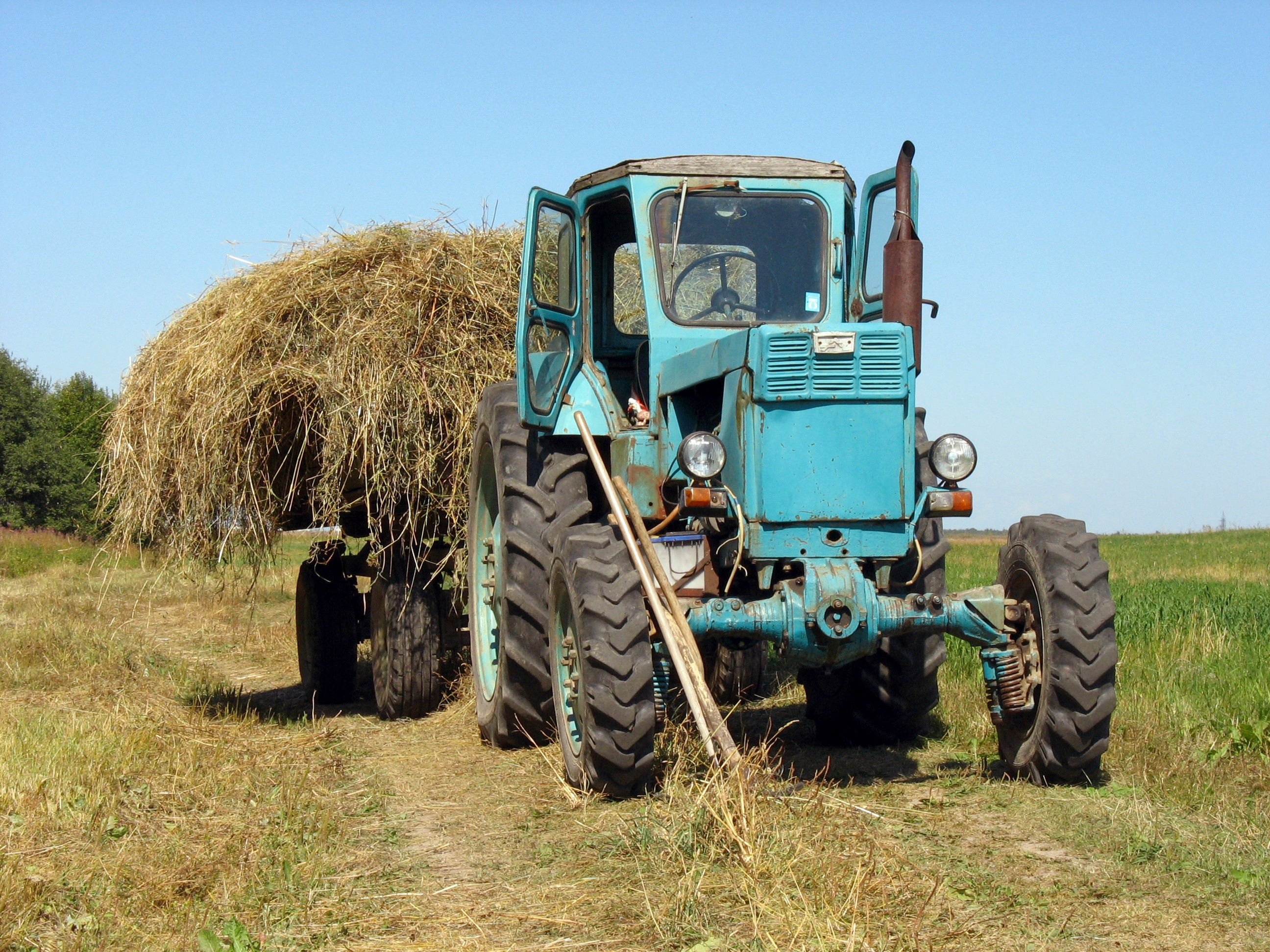 Трактор ЛТЗ в Волгоградской области